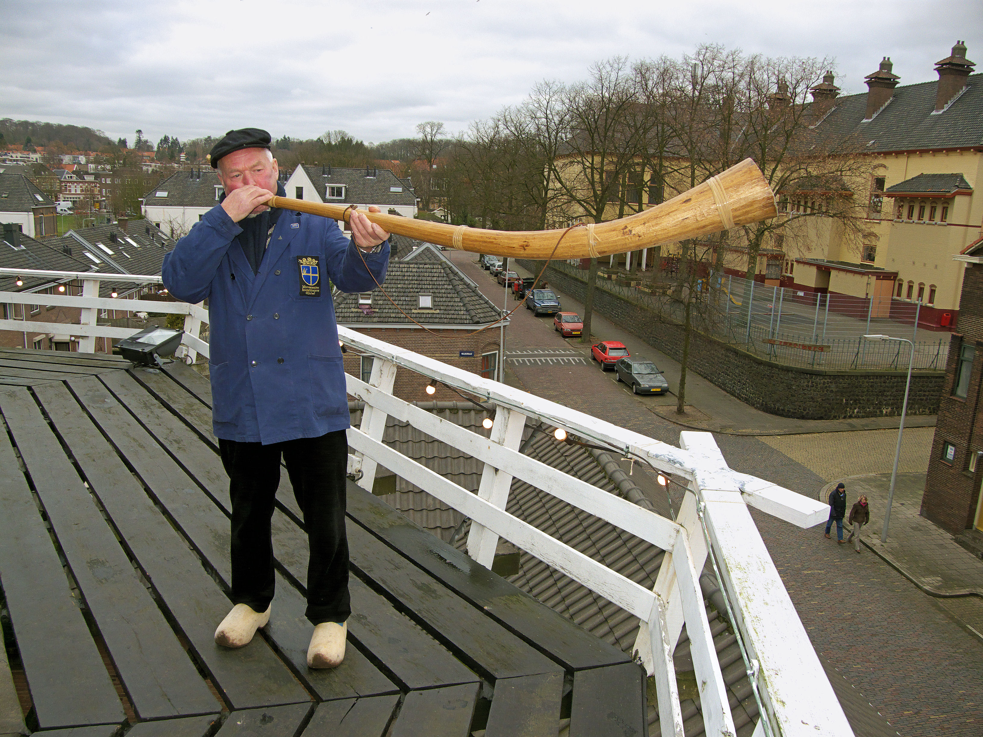 Molen De Kroon Arnhem Midwinterhoornblazen